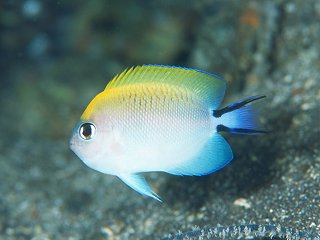 Genicanthus melanospilos en la Península de Izu, Japón